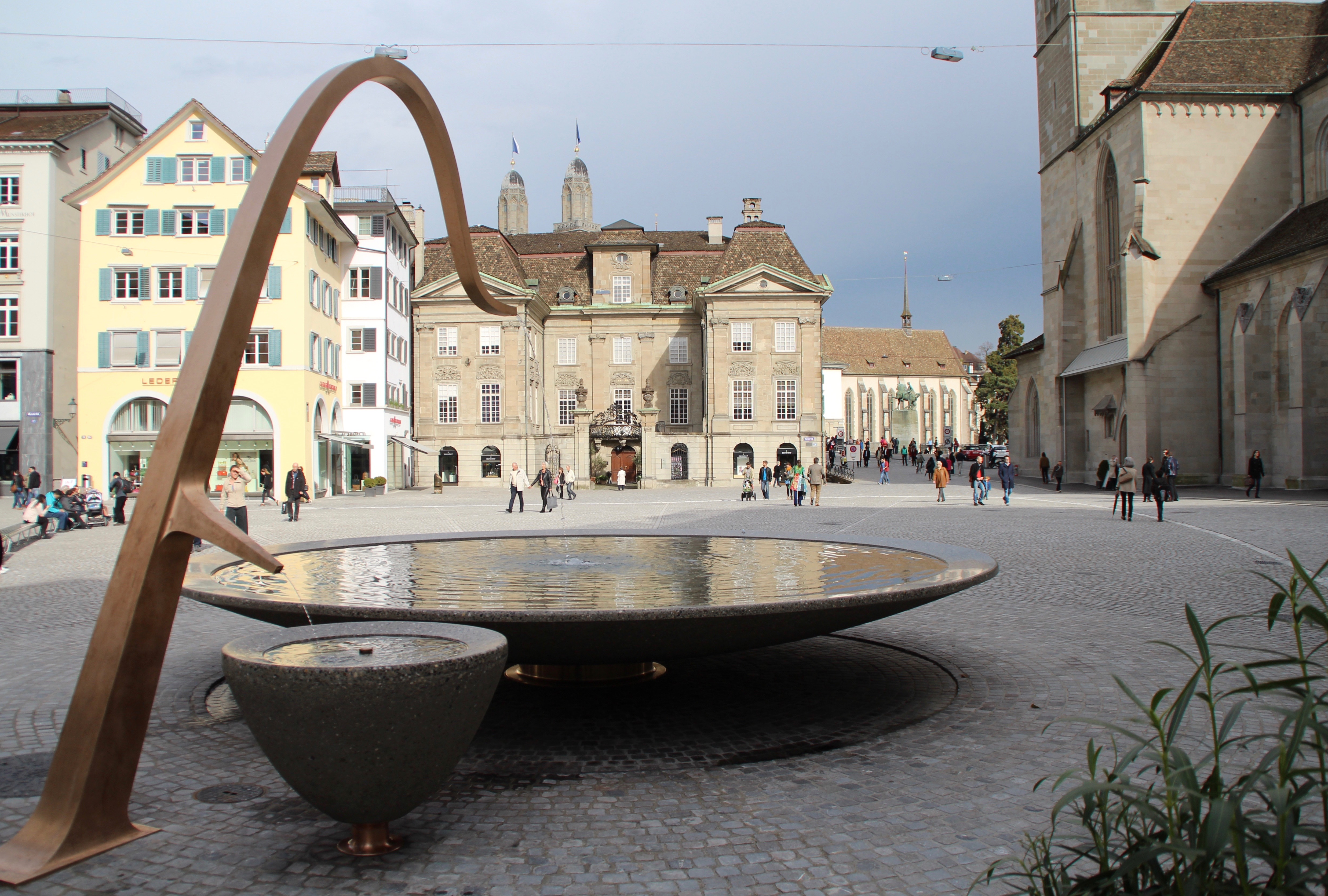 Der neu gestaltete Münsterhof (Zürich); im Hintergrund das Zunfthaus zur Meisen